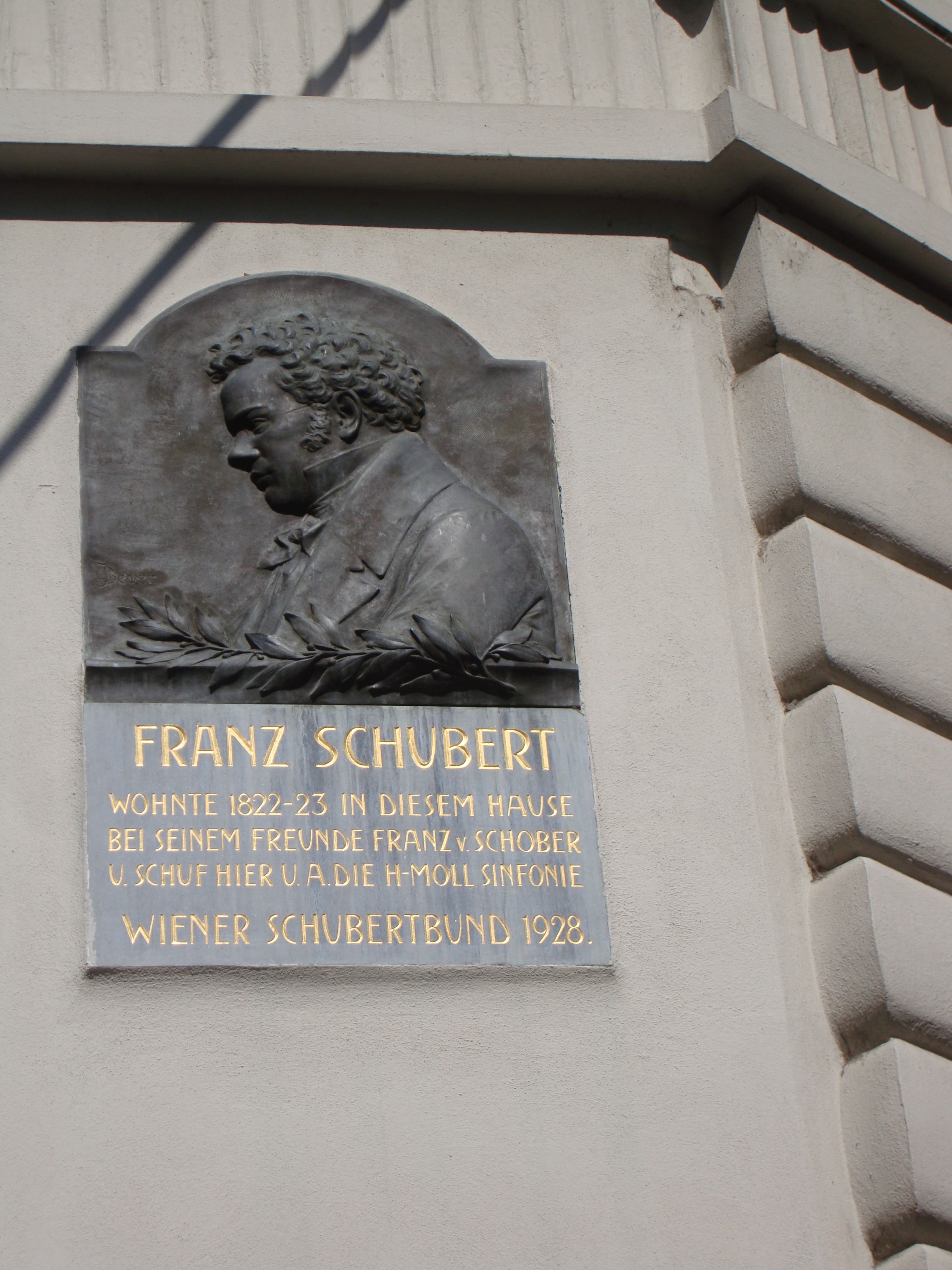 Göttweiger Hof Spiegelgasse 2, Wien Innere Stadt